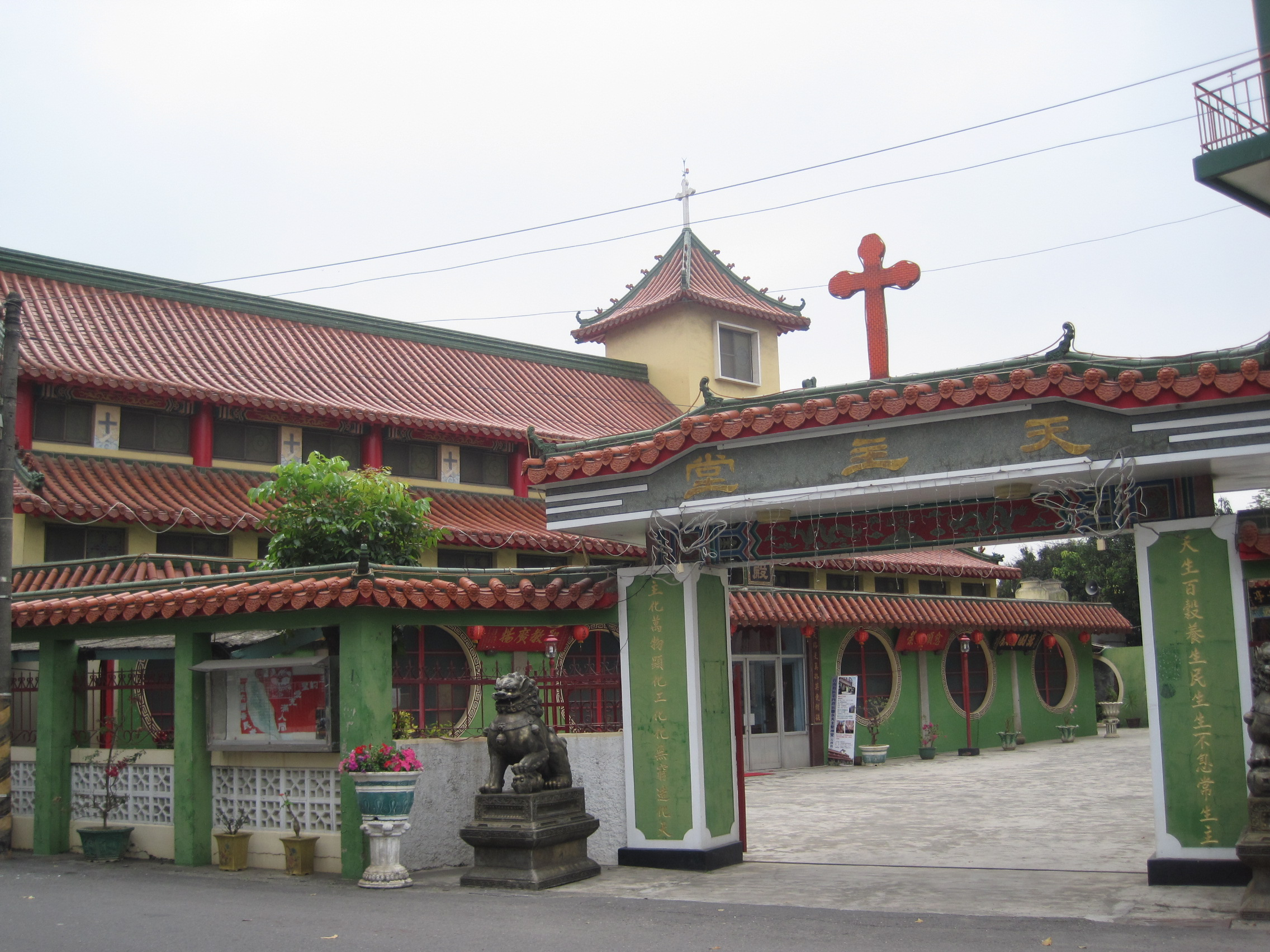 鹽水天主堂